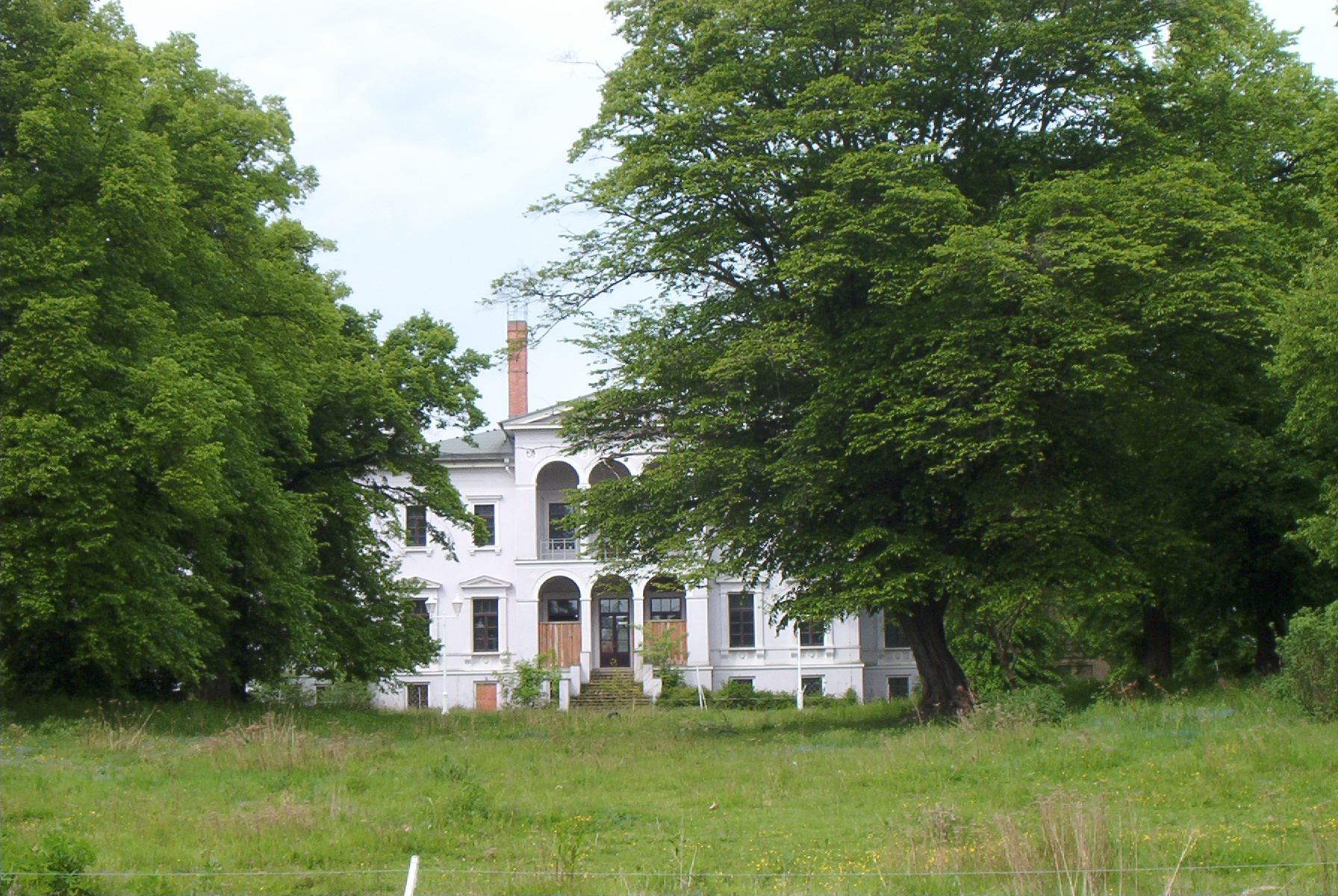 Schloss Randau, Blick vom Park